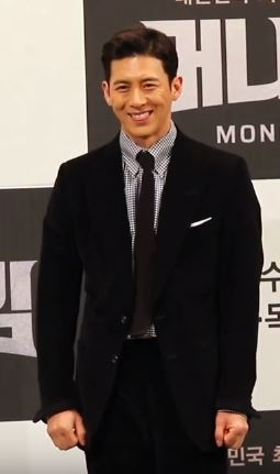 1월 8일 오후 서울시 강남구 논현동 임피리얼 팰리스 서울에서 tvN 새 수목드라마 '머니게임'의 제작발표회가 열려 배우 심은경, 고수, 이성민이 참석해 포토타임을 갖고 있다.